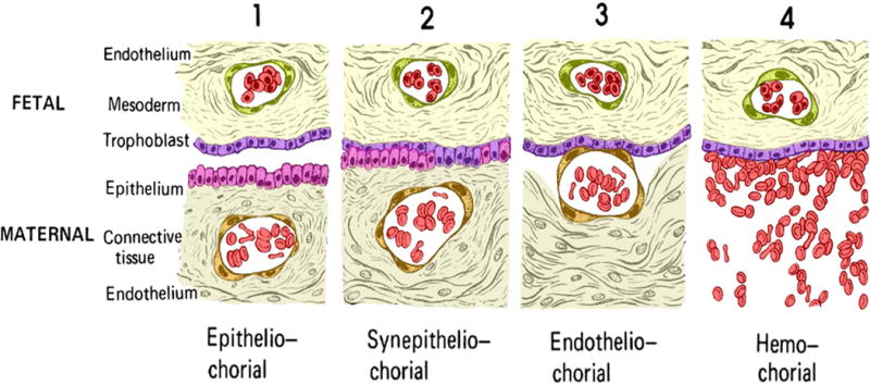 Cartoon indicating how placentas can be classified according to the numbers and kinds of cell layers that separate the bloodstreams of the mother and conceptus.